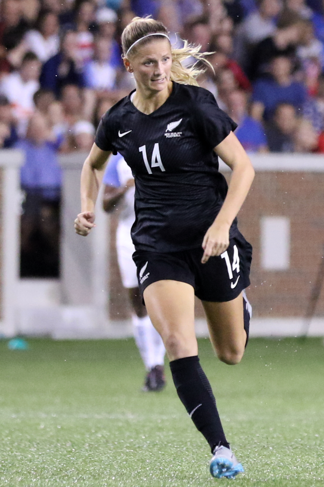 LindseyHoran